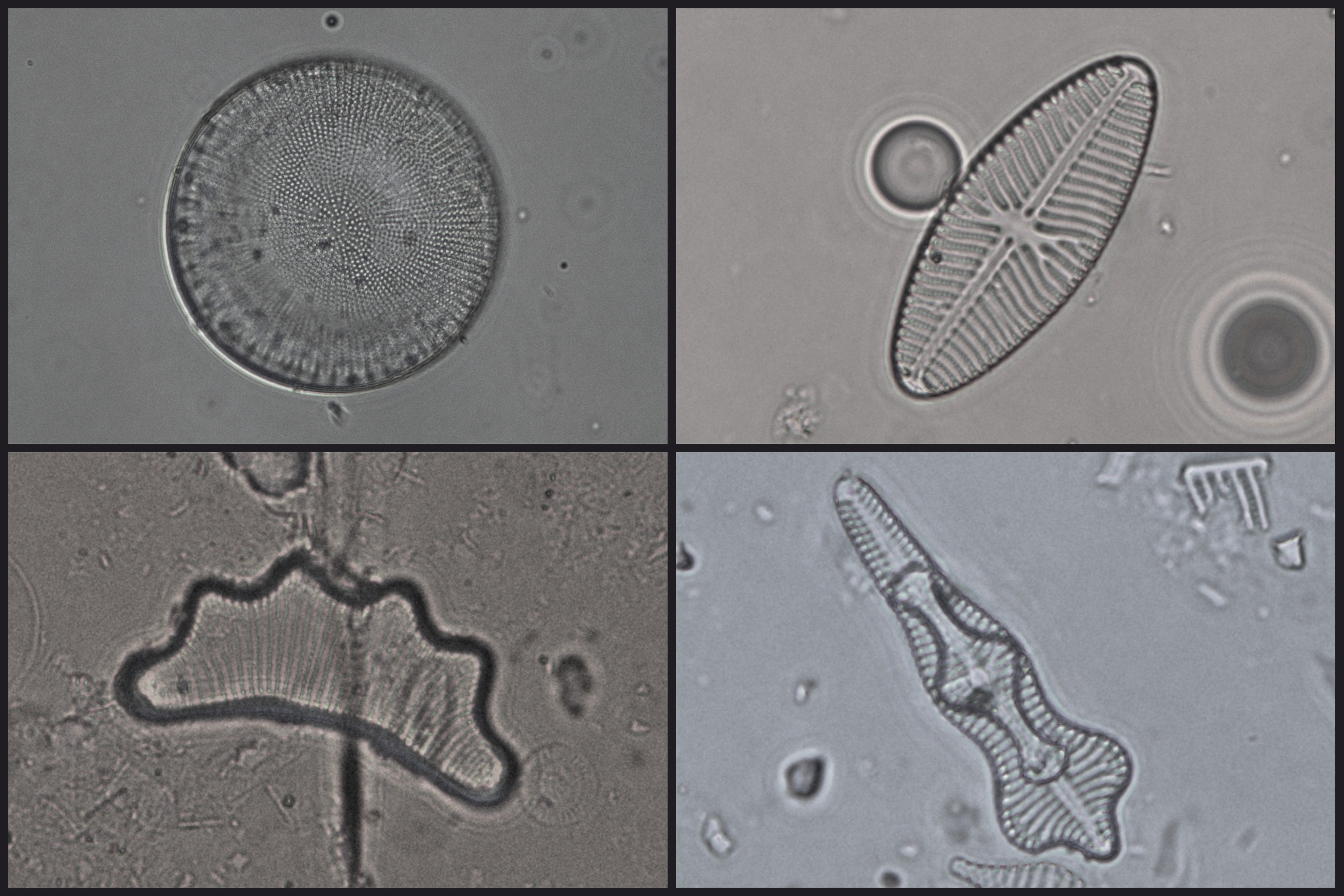 Mikroskoopilised ränivetikad Eesti järvesetetest (Foto: Liisa Puusepp)